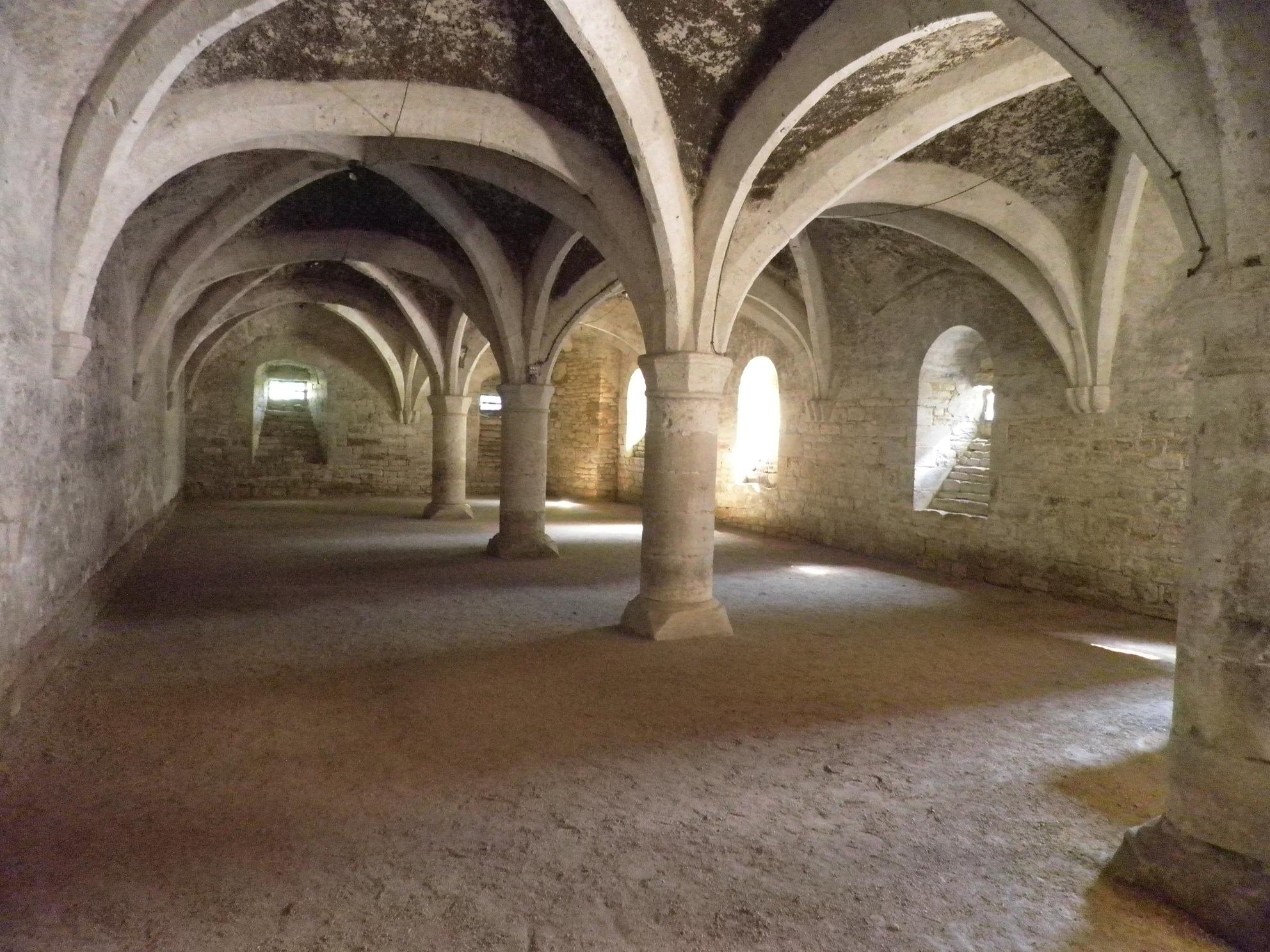 Le cellier du Château de Germolles